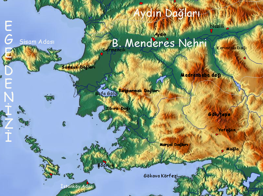 Beşparmak Dağları ve yakın çevresi haritası